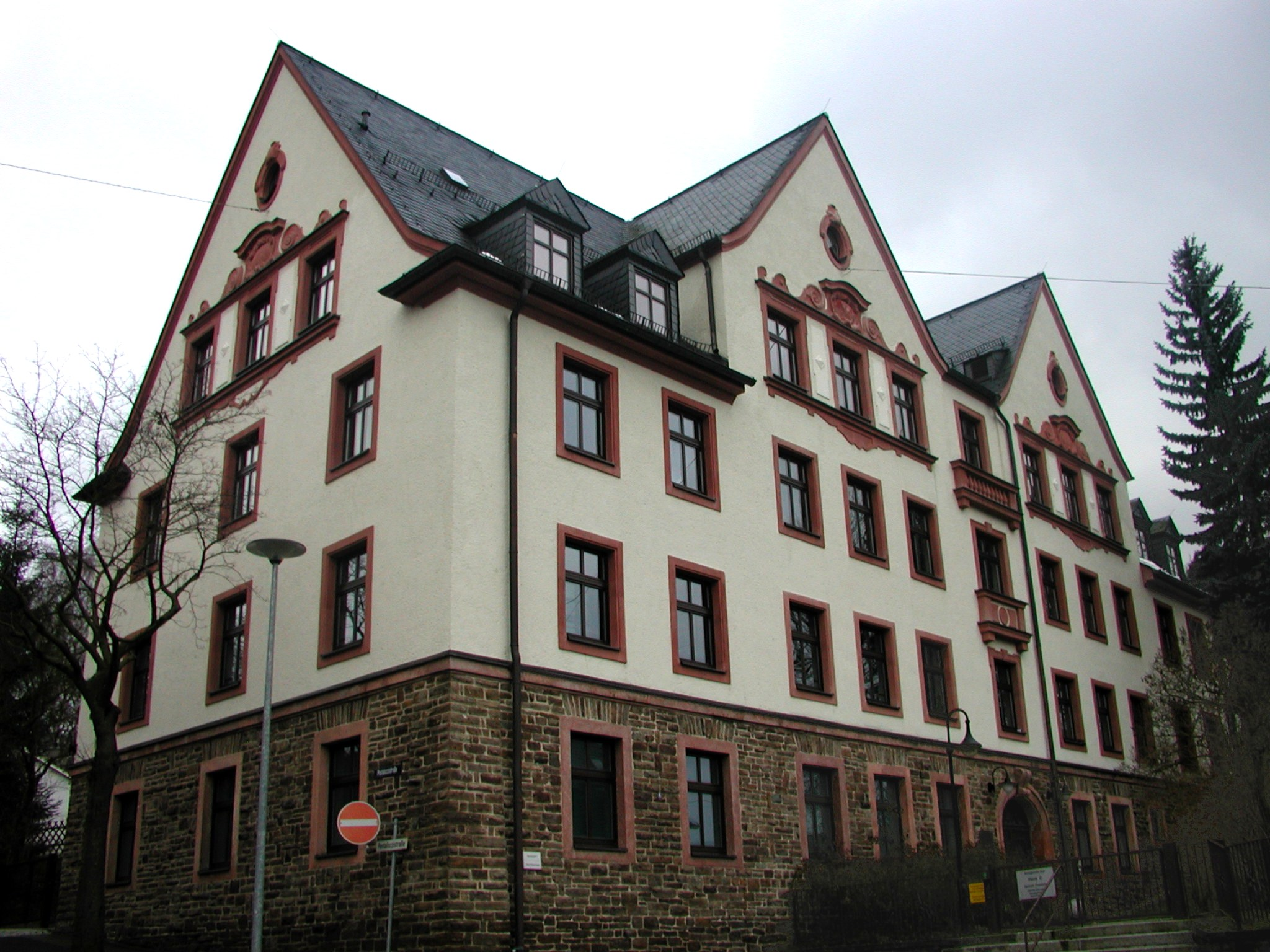 Das eh. Finanzamt in Aue